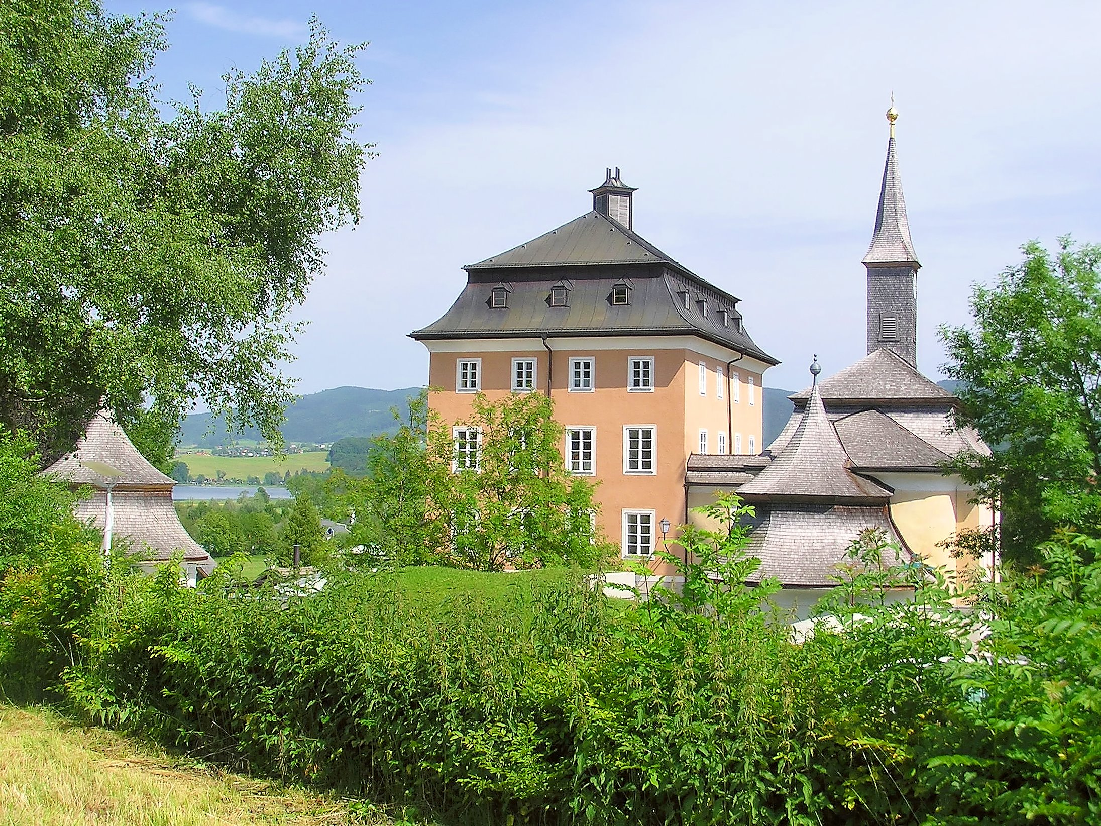 Schloss Seeburg in Seekirchen am Wallersee, Bundesland Salzburg in Österreich von Nordwesten.